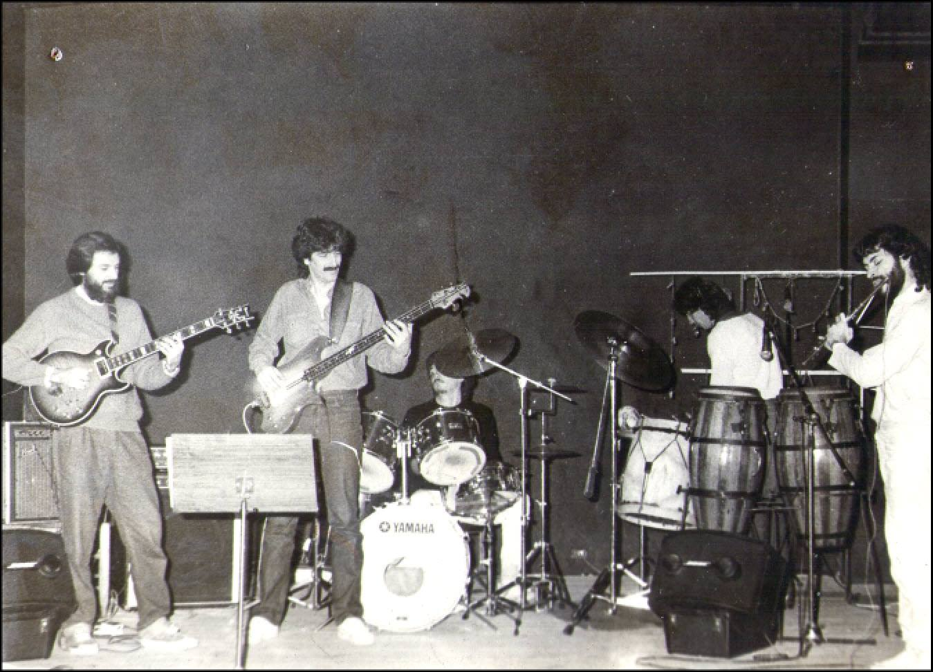 Tocando con Alejandro Santos Quinteto, Buenos Aires, 1987